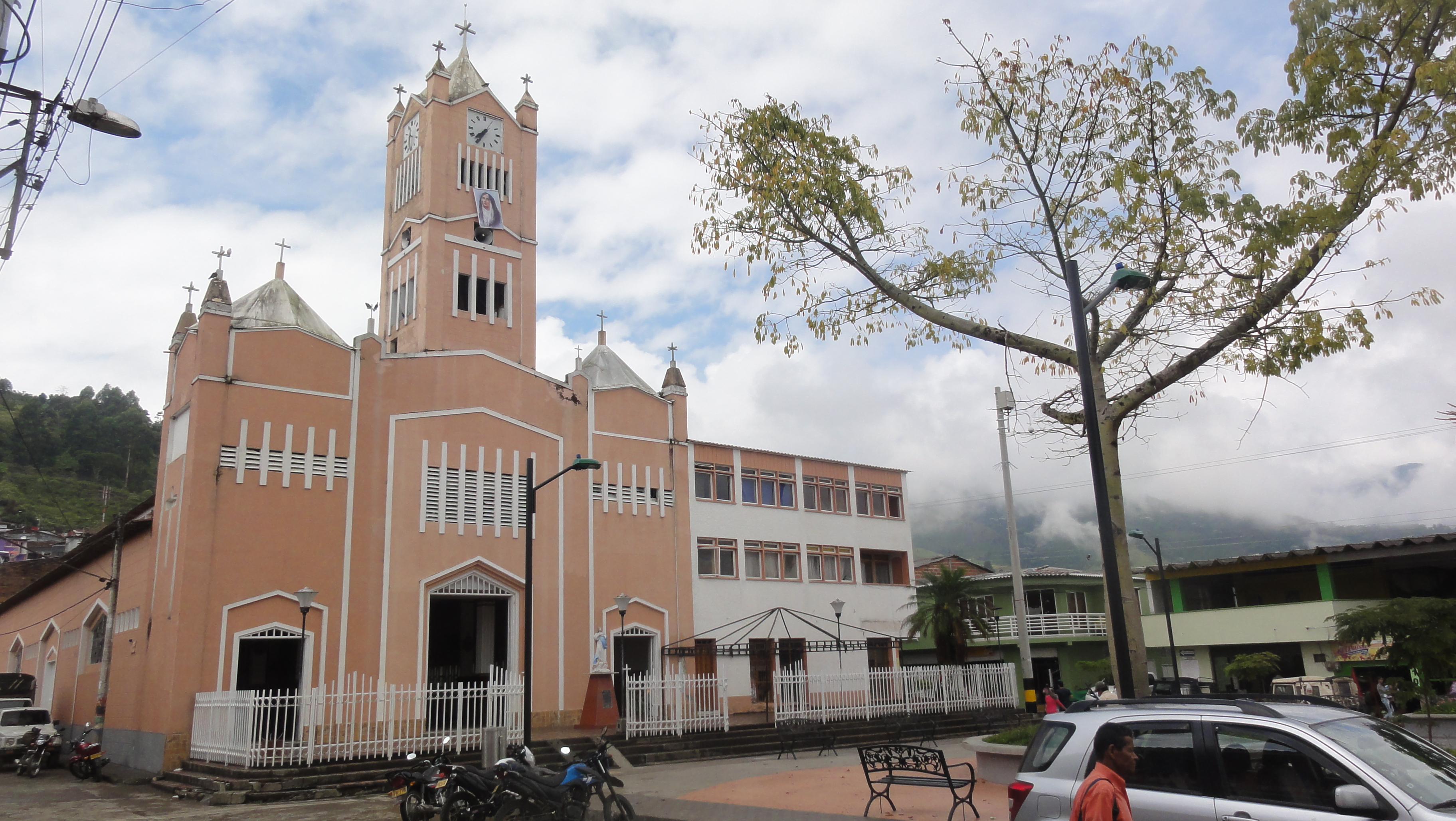 Iglesia La Inmaculada Concepción. El Águila, Valle del Cauca, Colombia.